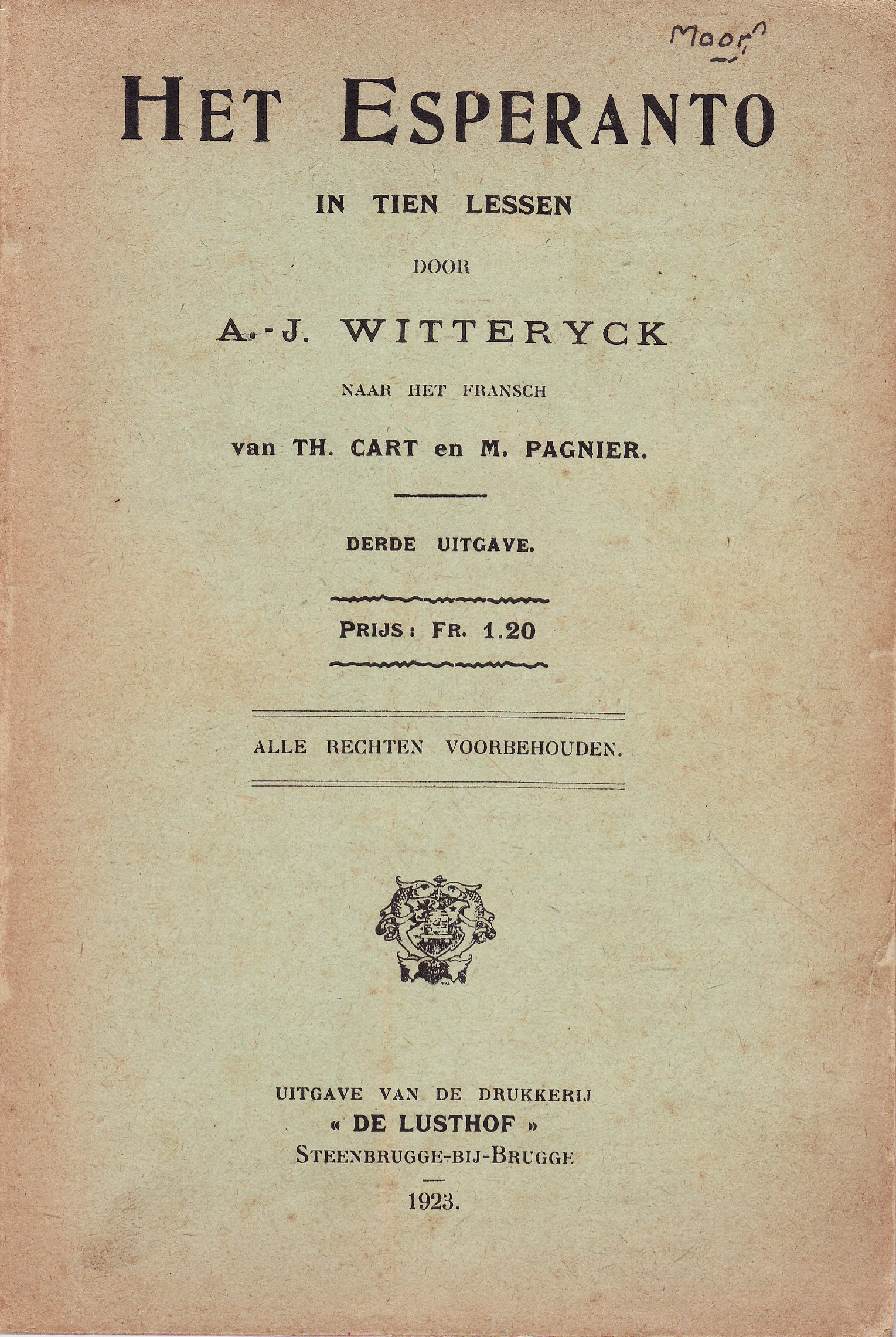 Het Esperanto in tien lessen